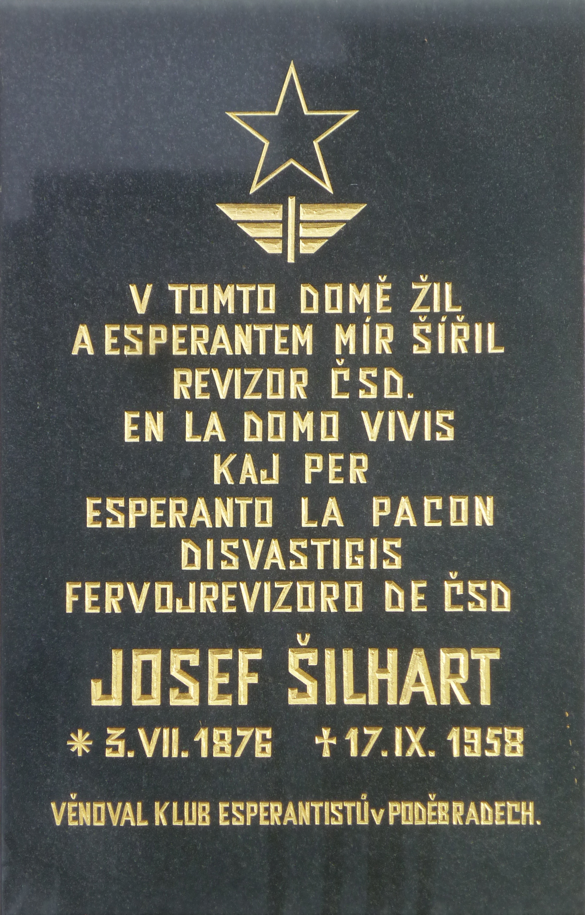 Memortabulo de Josef Šilhart en Nymburk